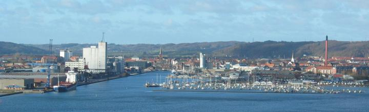 Vejle - as seen from Vejlefjord Bridge ©2004 Hans Jørn Storgaard Andersen